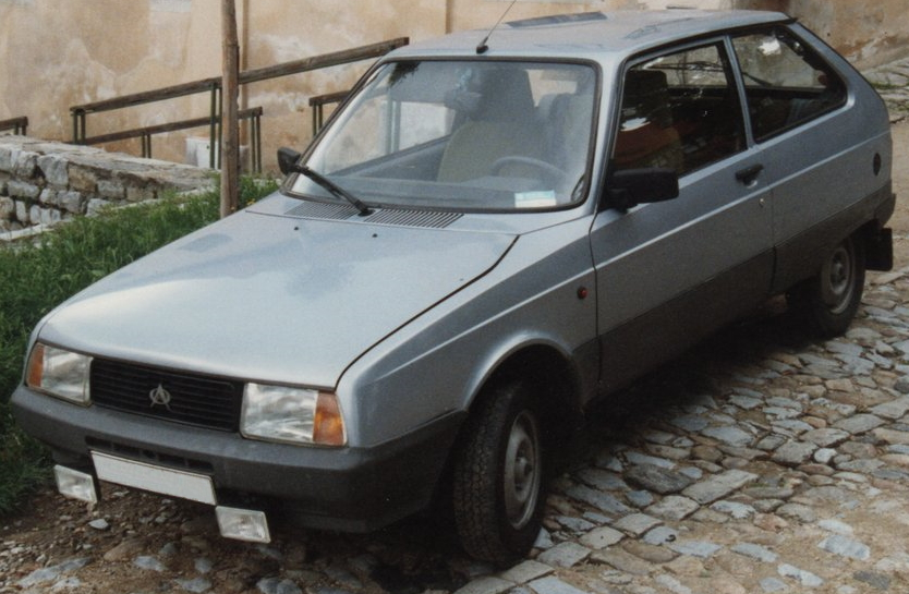 Quelle: Harald H. Linz Fotograf: Harald H. Linz Mit ausdrücklicher Genehmigung von Harald. H. Linz für Wiki eingestellt.